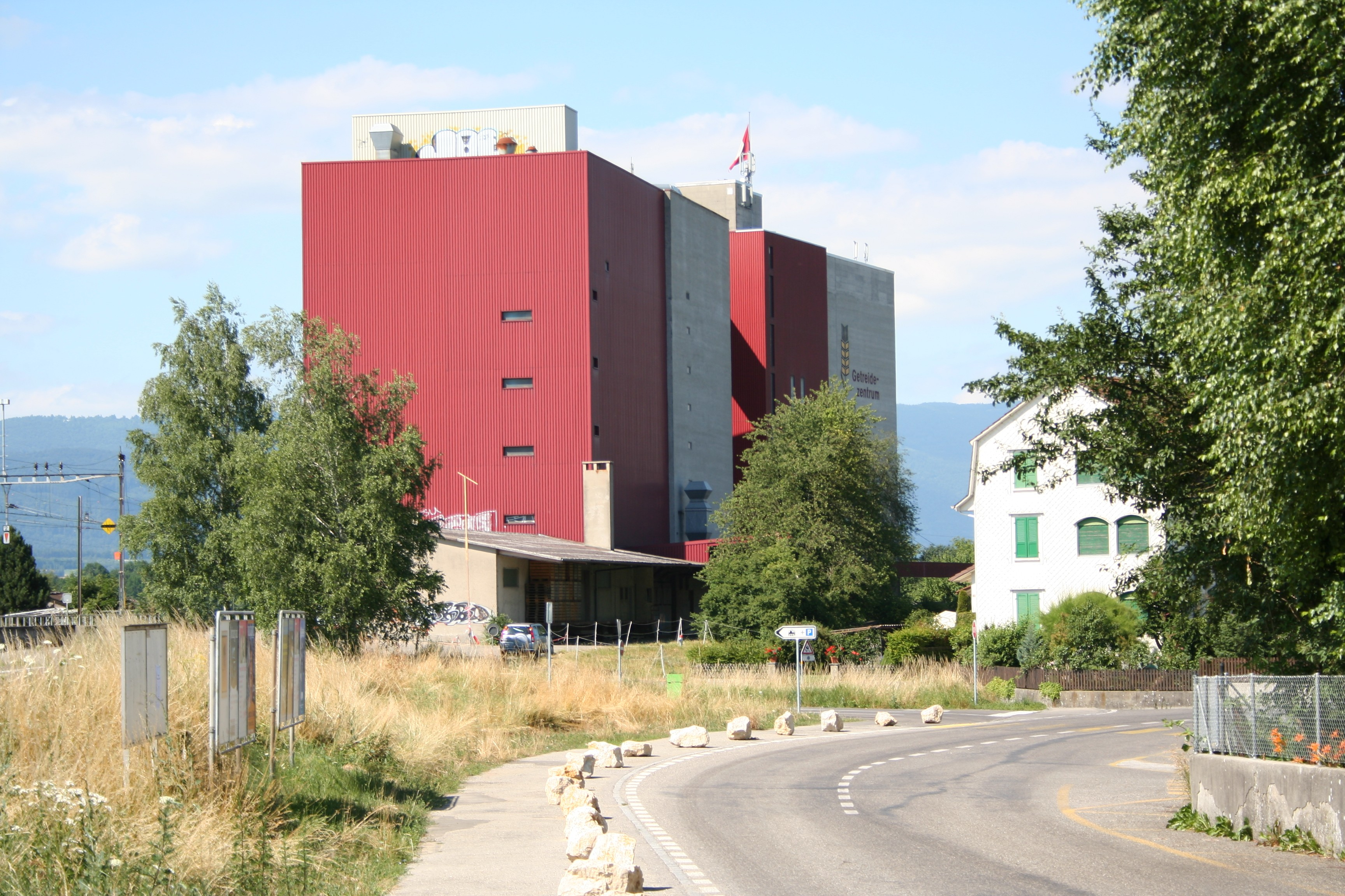 Der Getreidesilo von Busswil bei Büren, Schweiz. Der Silo ist das grösste und höchste Gebäude von Busswil. Neben Getreide ist hier auch Zucker eingelagert.